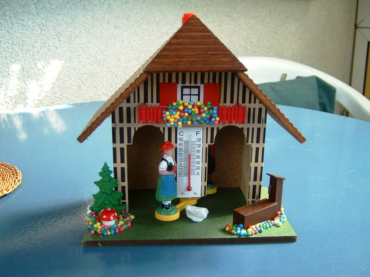 Wetterhäuschen aus Plastik; hier Schönwetter